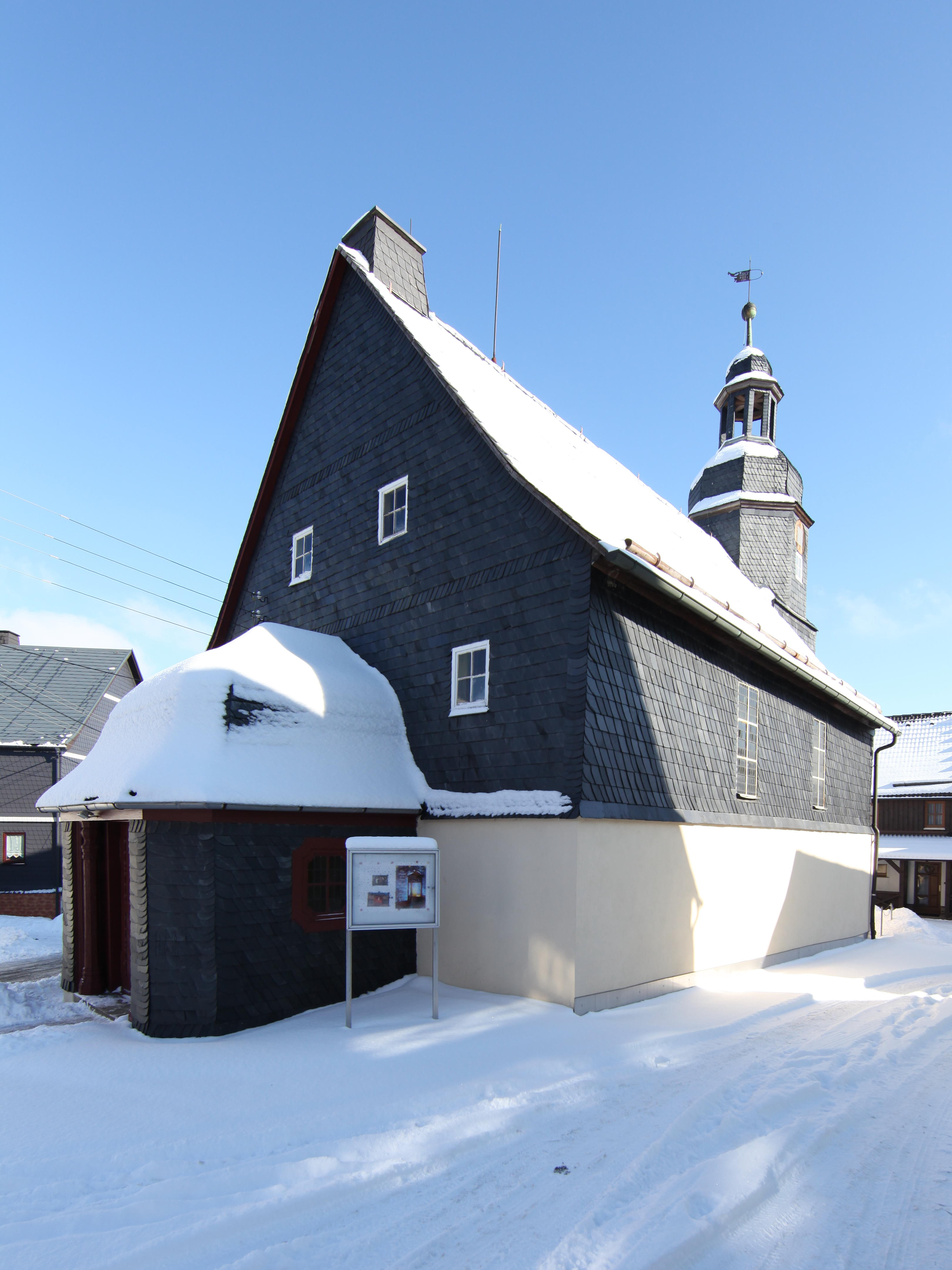 evangelisch-lutherische Sebastiankirche in Lichtenhain, OT von Gräfenthal